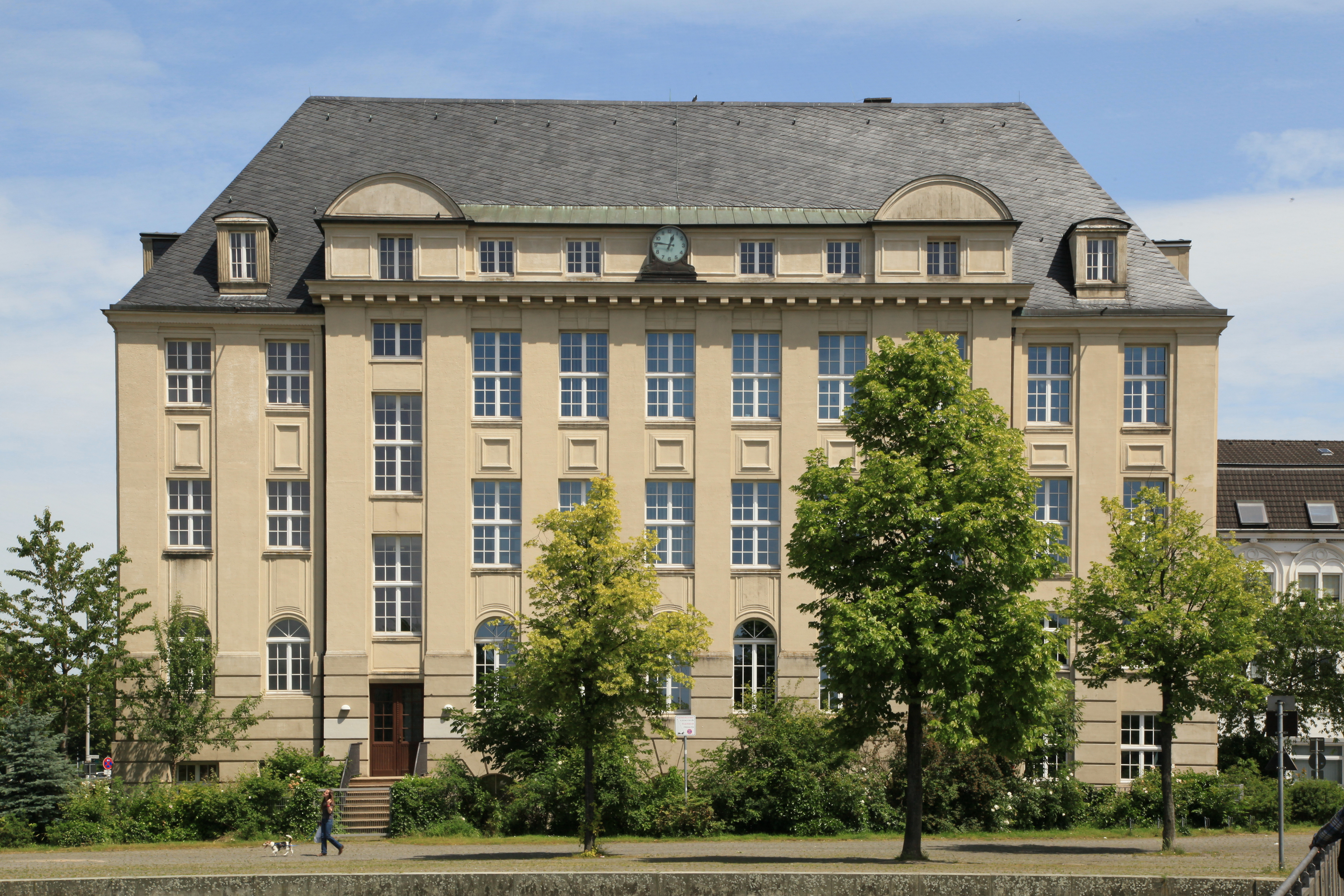 Ehemaliges Verwaltungsgebäude der Thyssen-Gießerei in der Bochumer Straße 86 in Gelsenkirchen, 1993–2015 Sitz des Arbeitsgerichts Gelsenkirchen